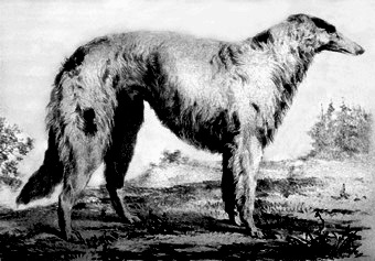 Аркадий Сергеевич Вышеславцев (1819—1889). Густопсовая борзая